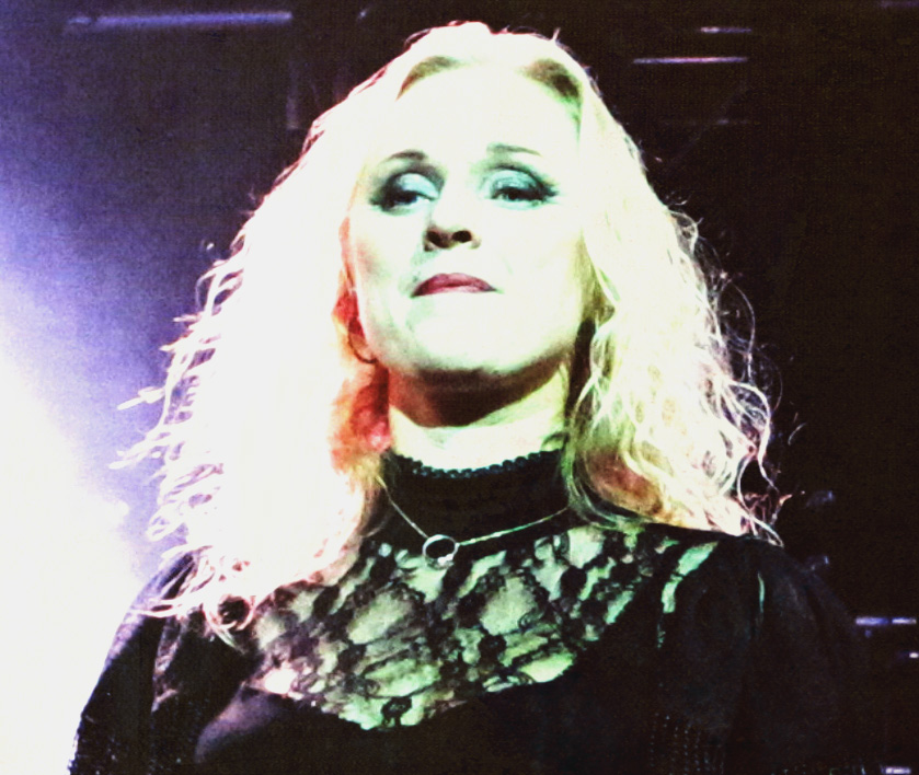 Liv Kristine at Alte Seminarturnhalle Club. In Nagold, Germany.